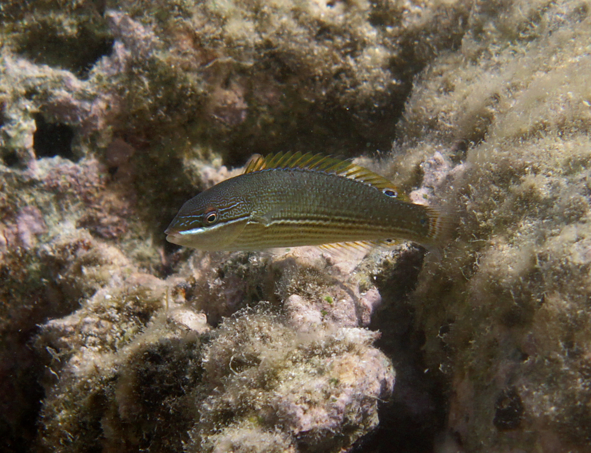 Un labre Stethojulis strigiventer à la Réunion.